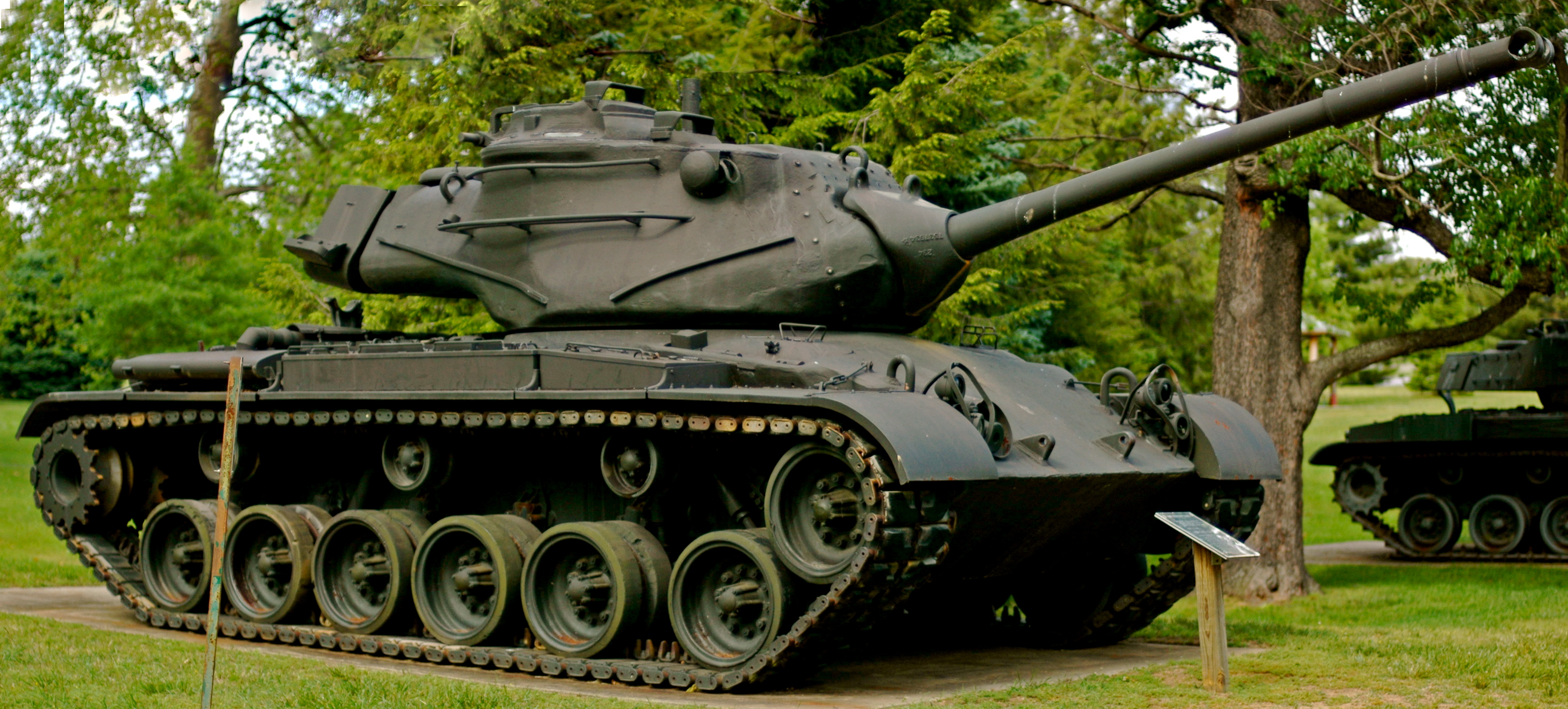 Amerykański czołg M47 Patton, zdjęcie zrobione w Fort Meade, Maryland